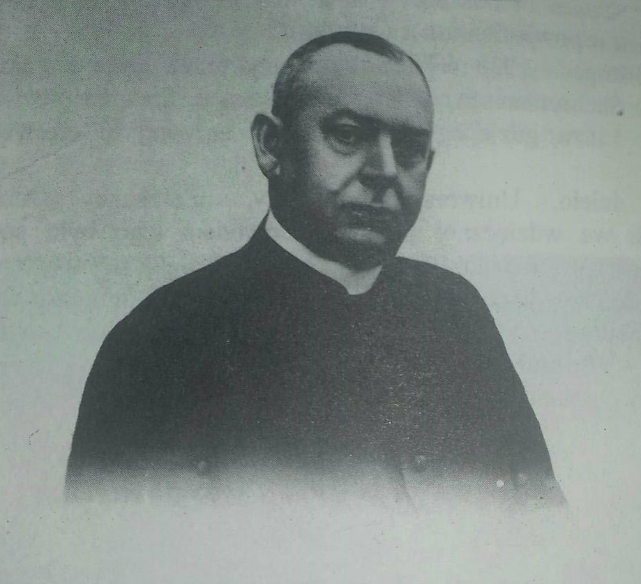 Ks. Bartłomiej Piszczygłowa